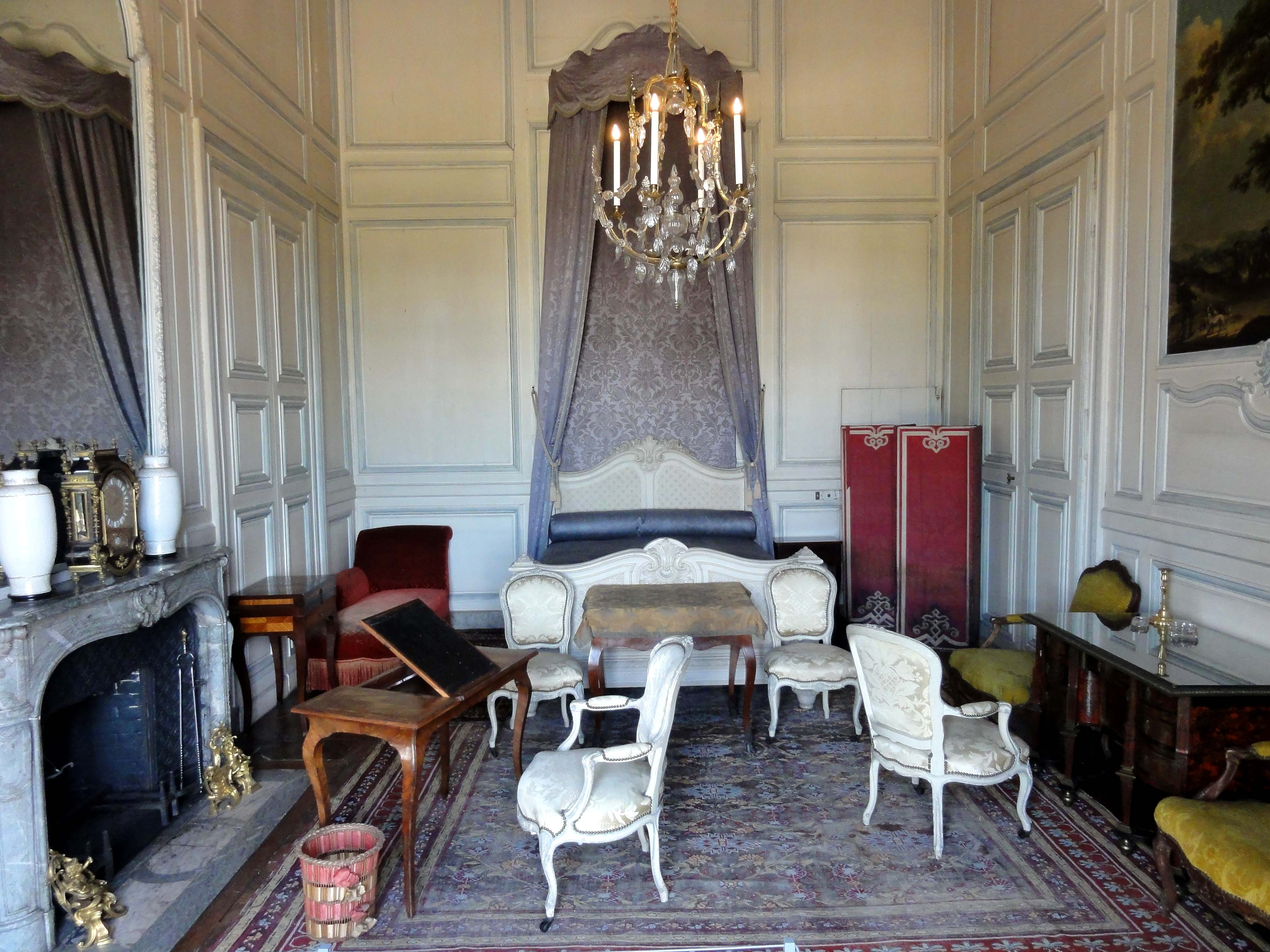 Intérieur du château - voir le titre du fichier.